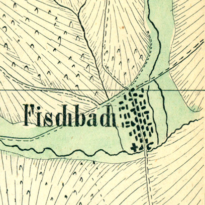 Karte vom Herzogthum Nassau : von den im Jahr 1819 geschehenen Aufnahmen längs der Preussischen und Hessischen Gränzen etc. ; orientirt nach Parallelen vom Meridian und Perpendikel von Paris